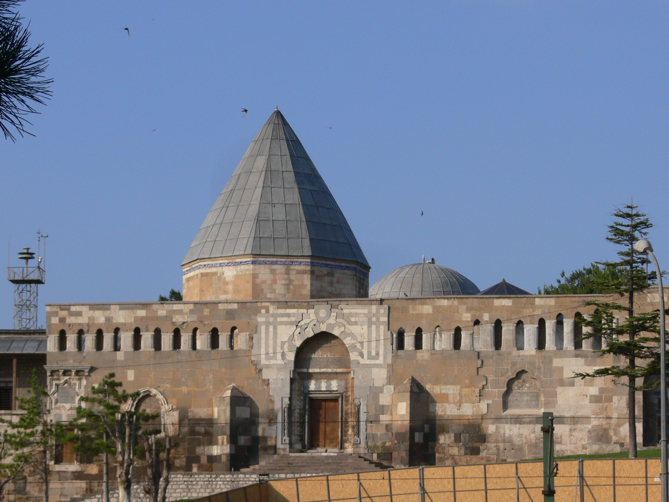 Mosquée seldjoukide achevée en 1220-1221 par Kaykobat 1er. Façade sur Aleddîn Caddesi